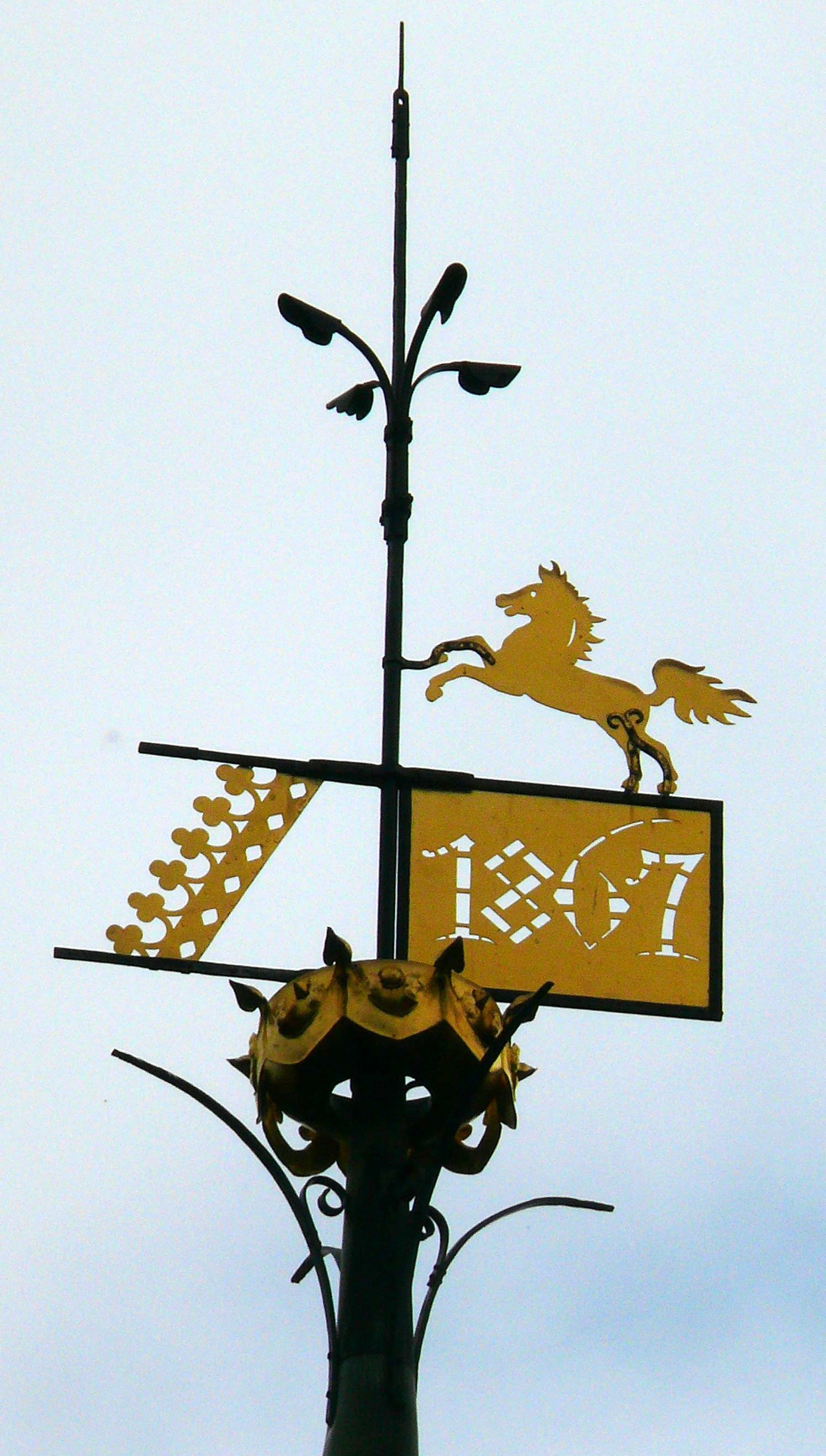 Schloß Marienburg - Wetterfahne 1867